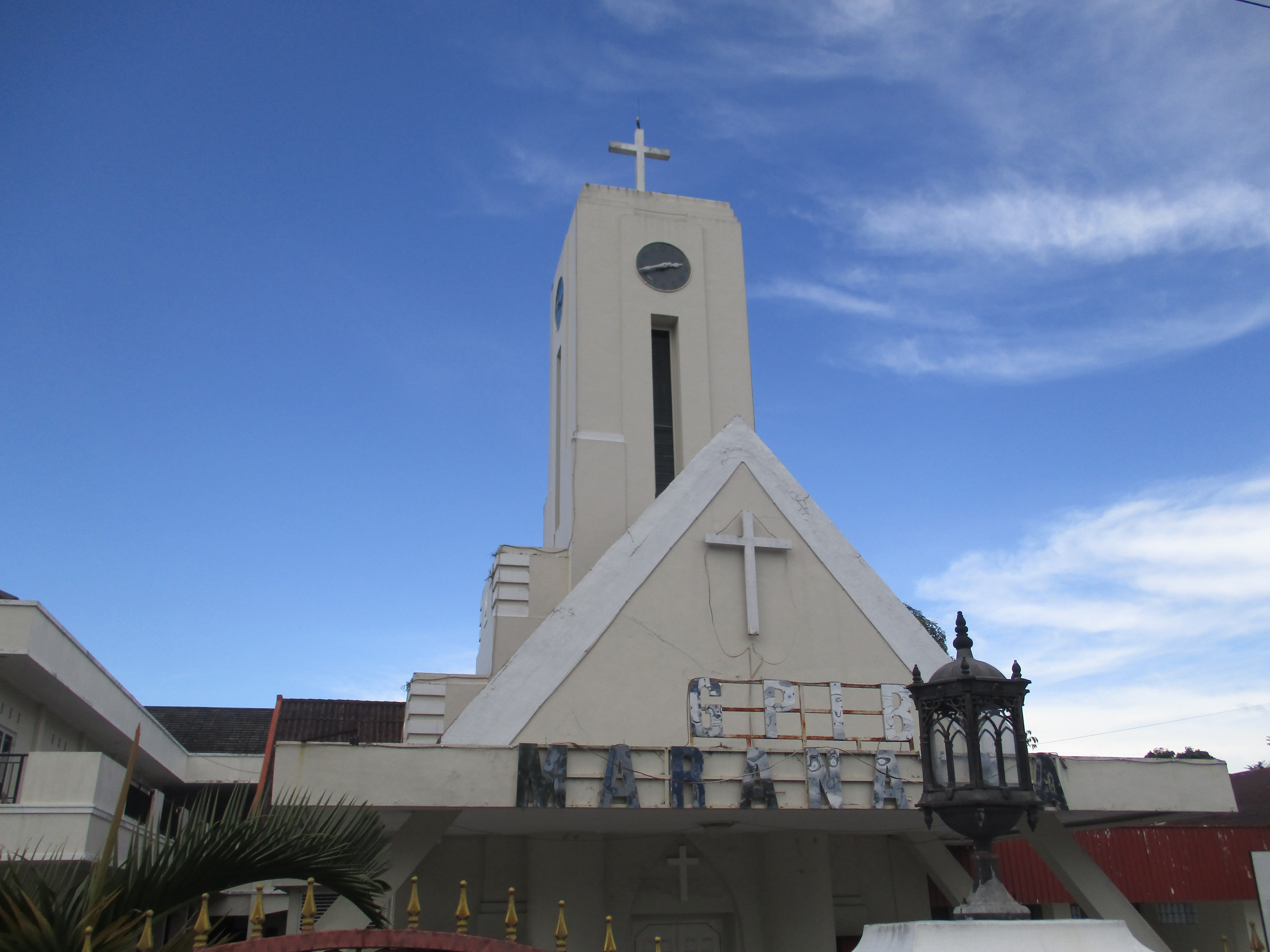 邦加檳港Maranatha基督新教教會